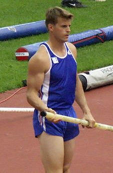 Jean Galfione aux Championnats du monde d'Helsinki en 2005.